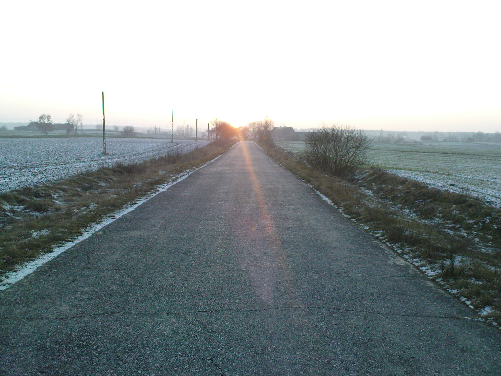 Główna droga (asfaltowa) we wsi